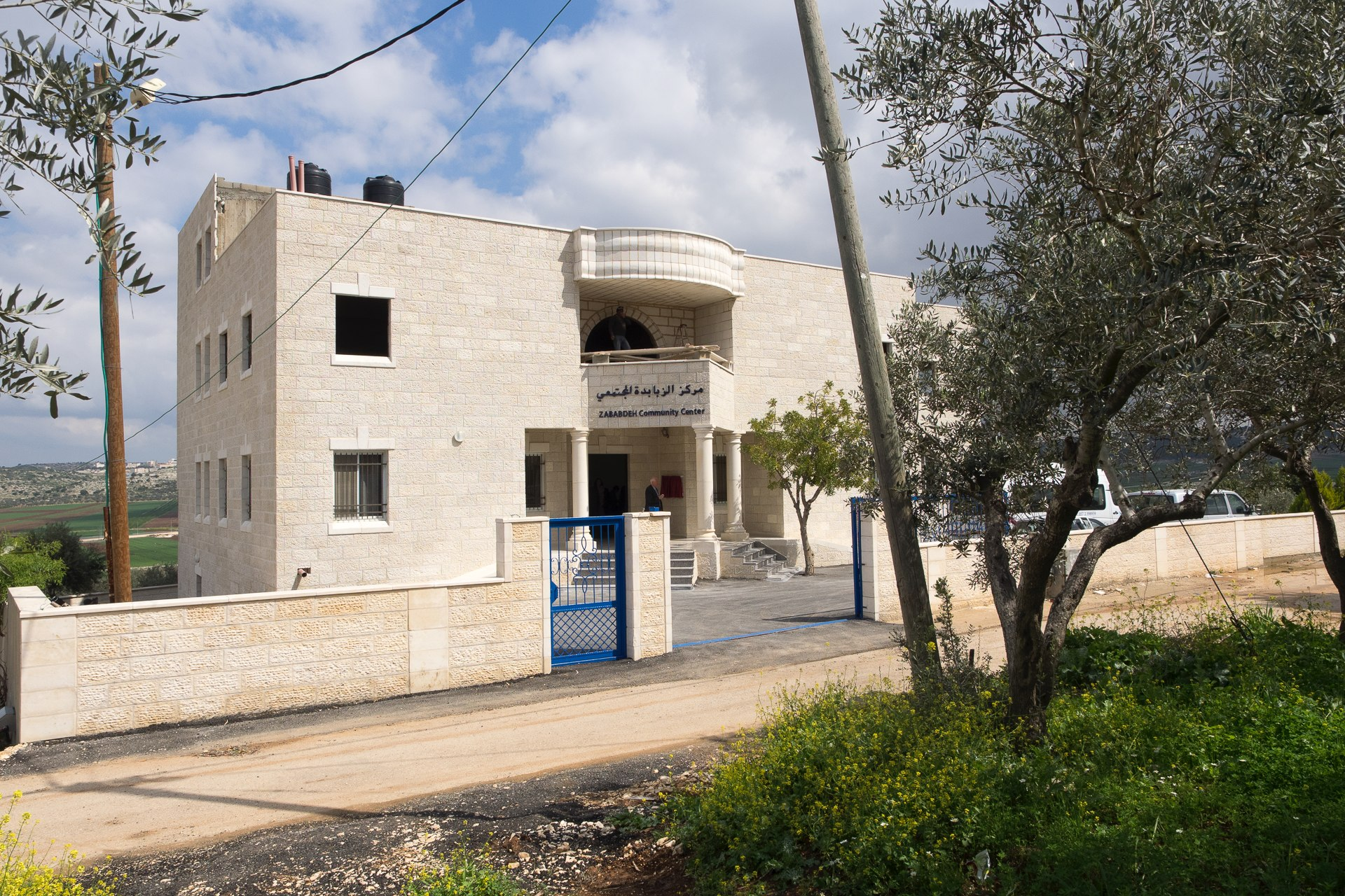 Zababdeh Community Center, gebouwd met steun van de stichting Tabitha Ministries, in Zababdeh (13 km ten zuiden van Jenin op de Westelijke Jordaanoever)